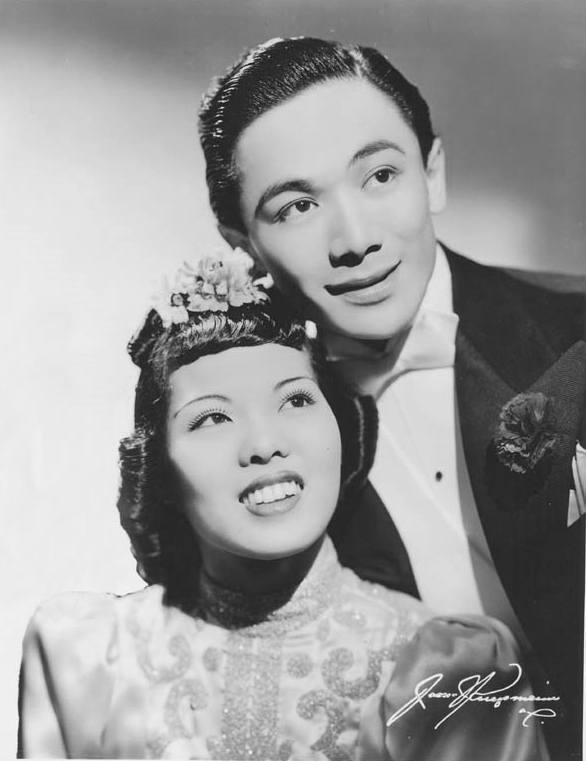 Tap dance duo Toy & Wing